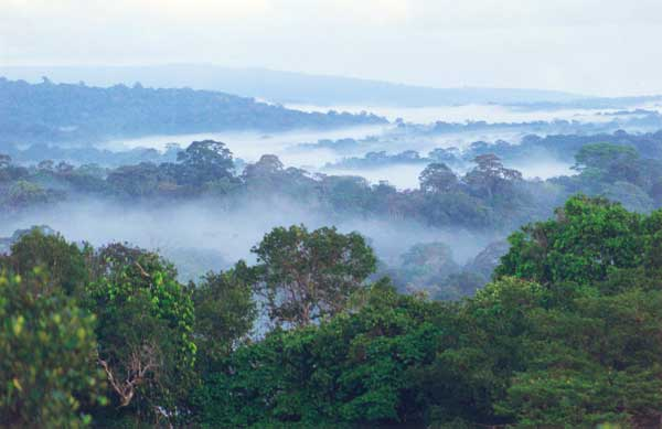 Février 1999. Située en rive droite de l'Approuague, cette butte rocheuse permet d'avoir une vue sur la forêt tropicale guyanaise. Elle abrite une flore particulière à cause de la faible épaisseur du sol (plantes xérophiles). Image sous copyright, avec autorisation du tenant du copyright : Utilisateur:delorme